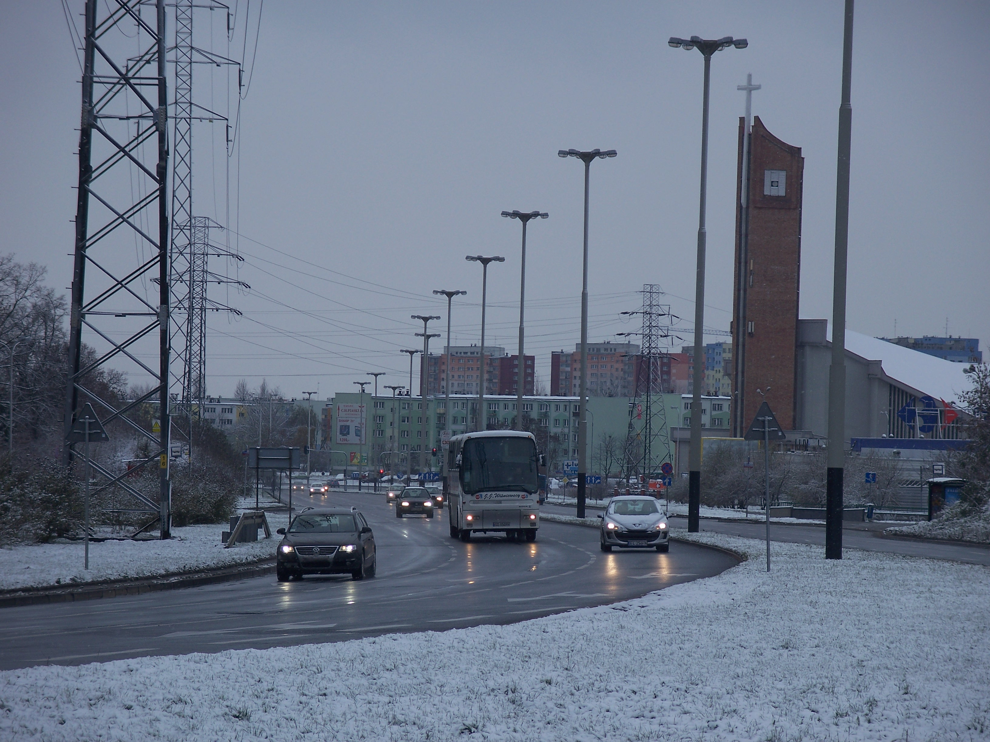 aleja Bandurskiego w Łodzi